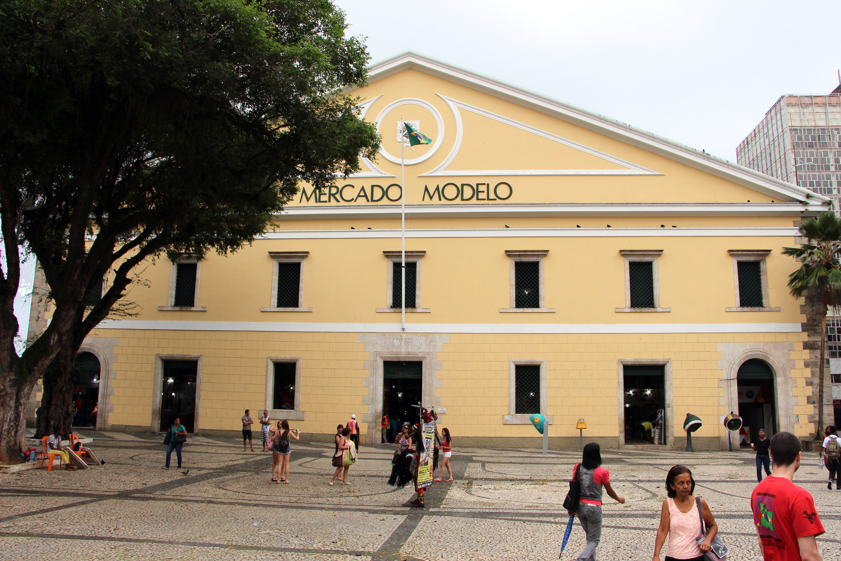 Praça Cairu, Salvador